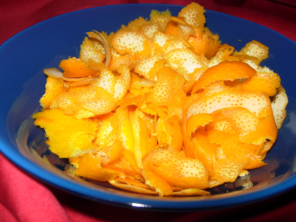 Glögg Recipe: orange peels